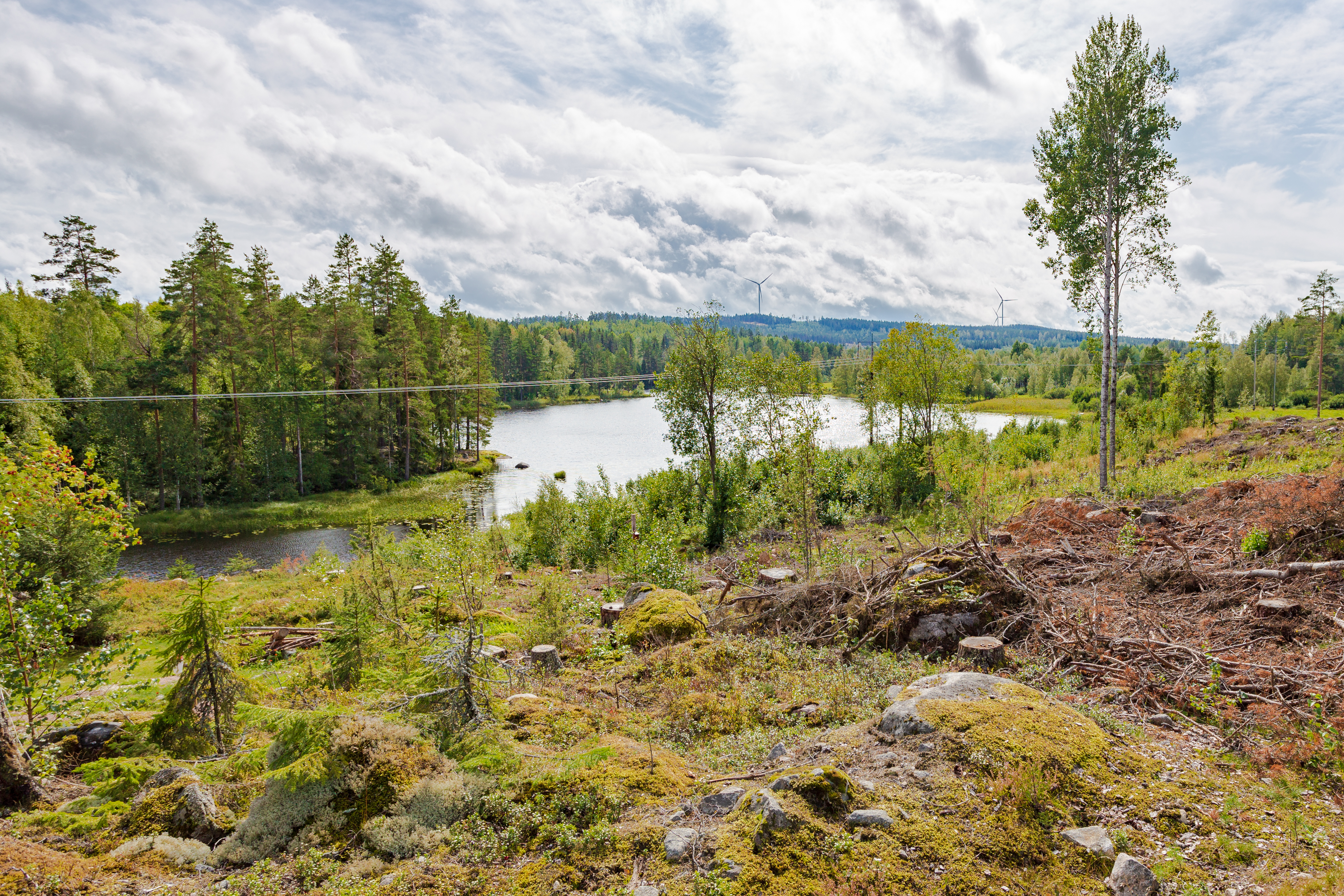 Sjön Ingelsbosjön, Hedemora kommun, Dalarnas län, Sverige. Vindkraftparken på Högtjärnsklack i bakgrunden.